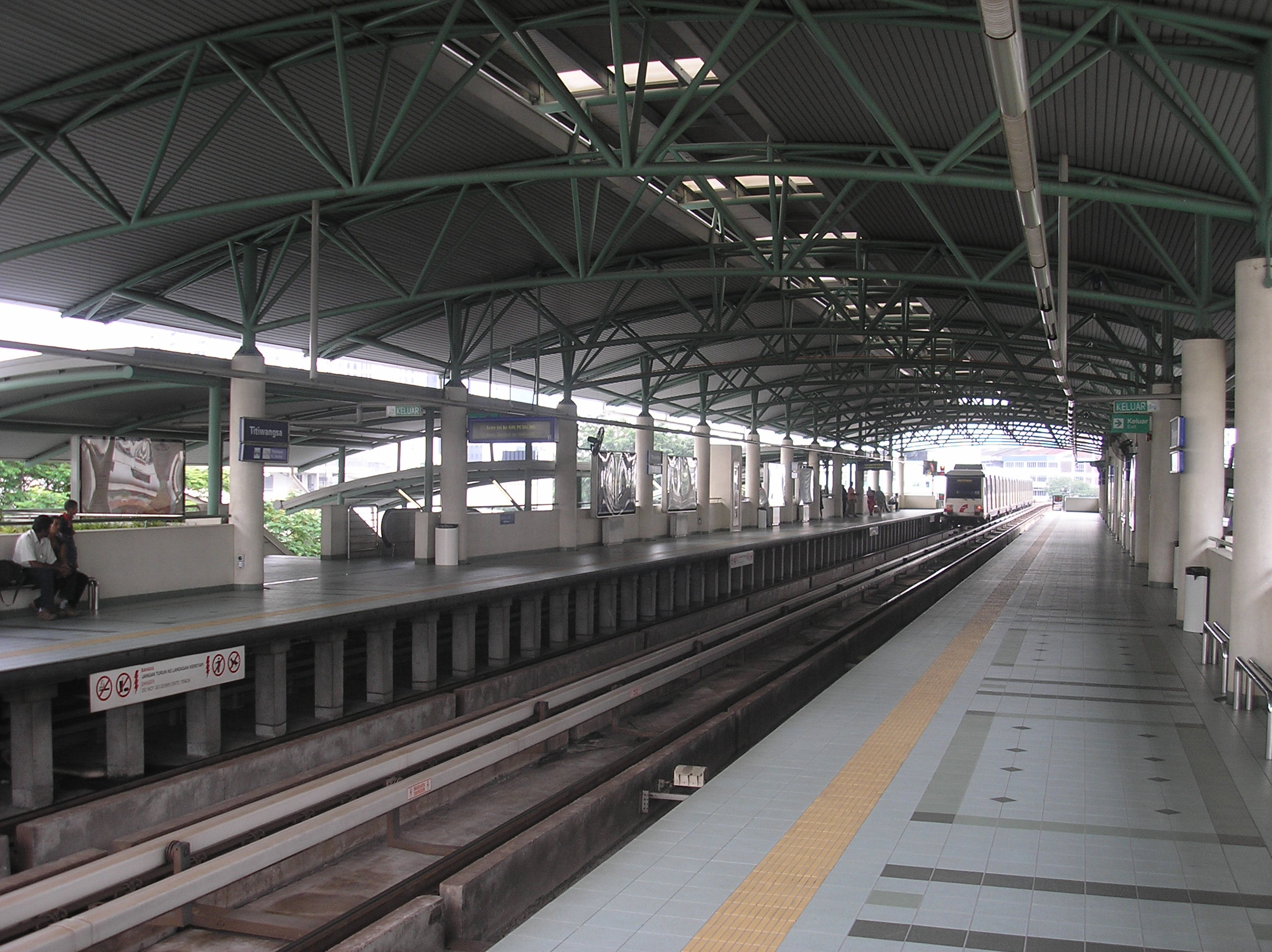 The Titiwangsa station (Sri Petaling Line/Ampang Line), Kuala Lumpur, Malaysia.